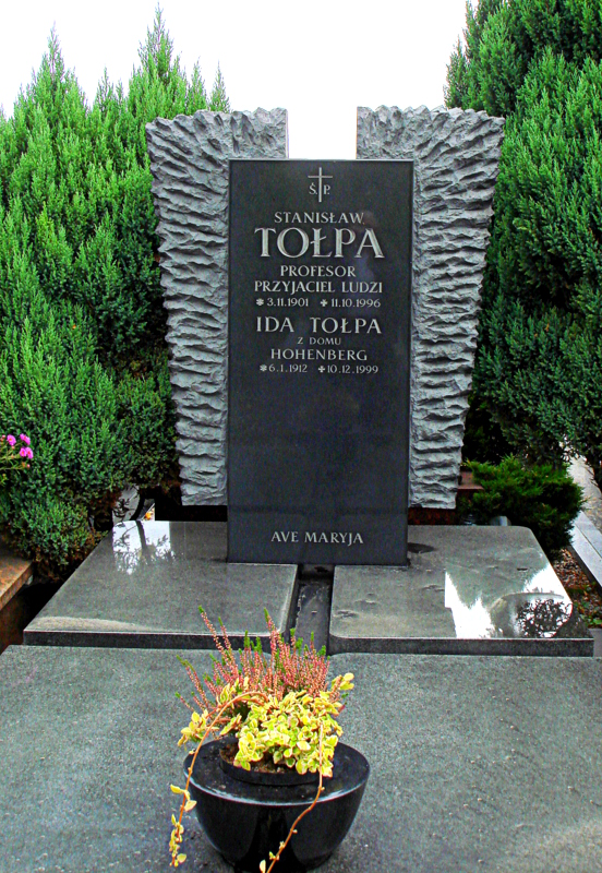 Wrocław, cmentarz parafialny przy ul. Bardzkiej, grób prof. Stanisława Tołpy i jego małżonki Idy